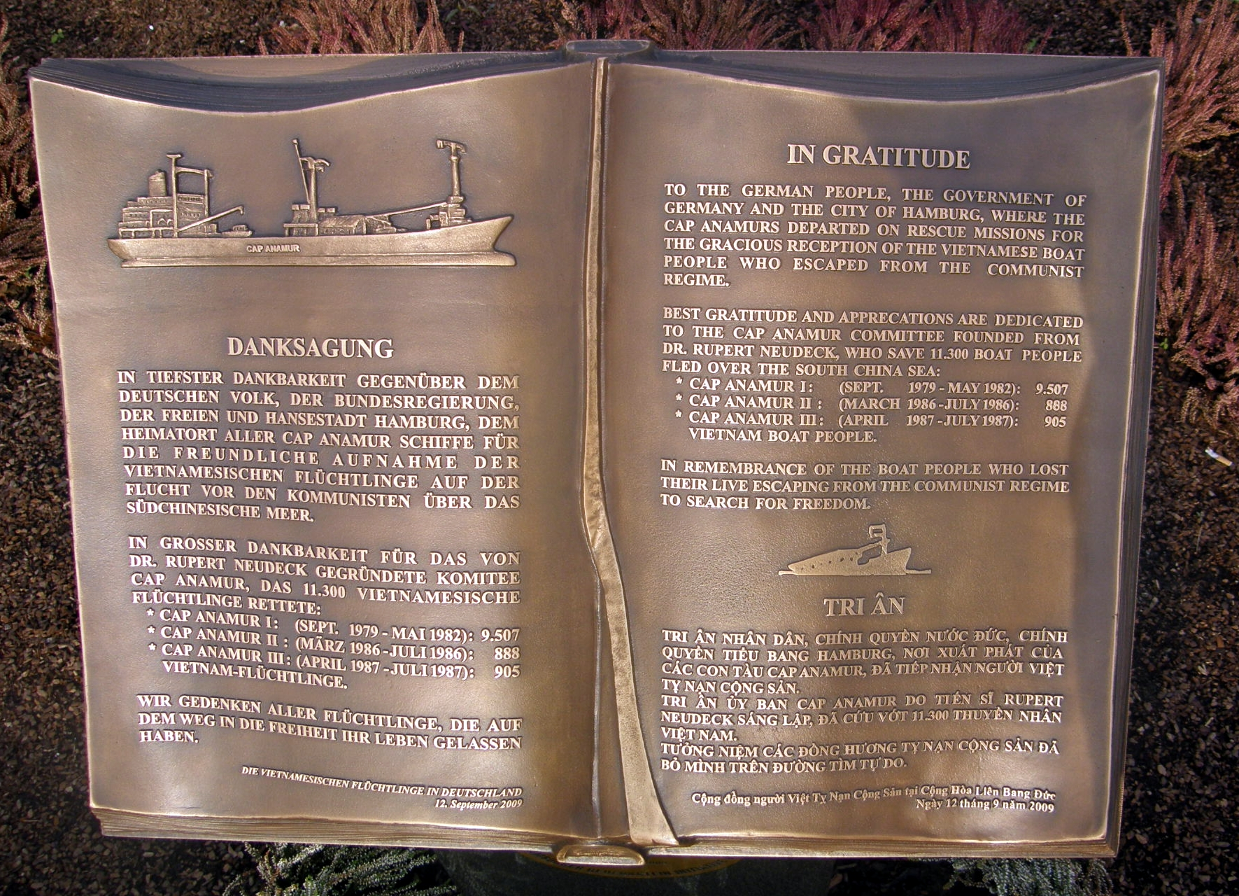 bronzetafel am cap anamur denkmal hamburg johannisbollwerk